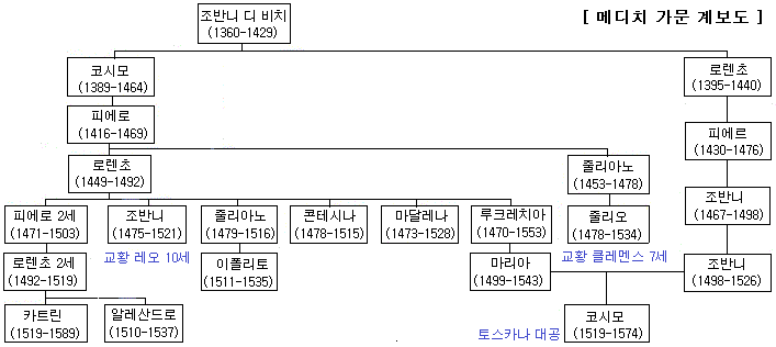 메디치 가문 계보도